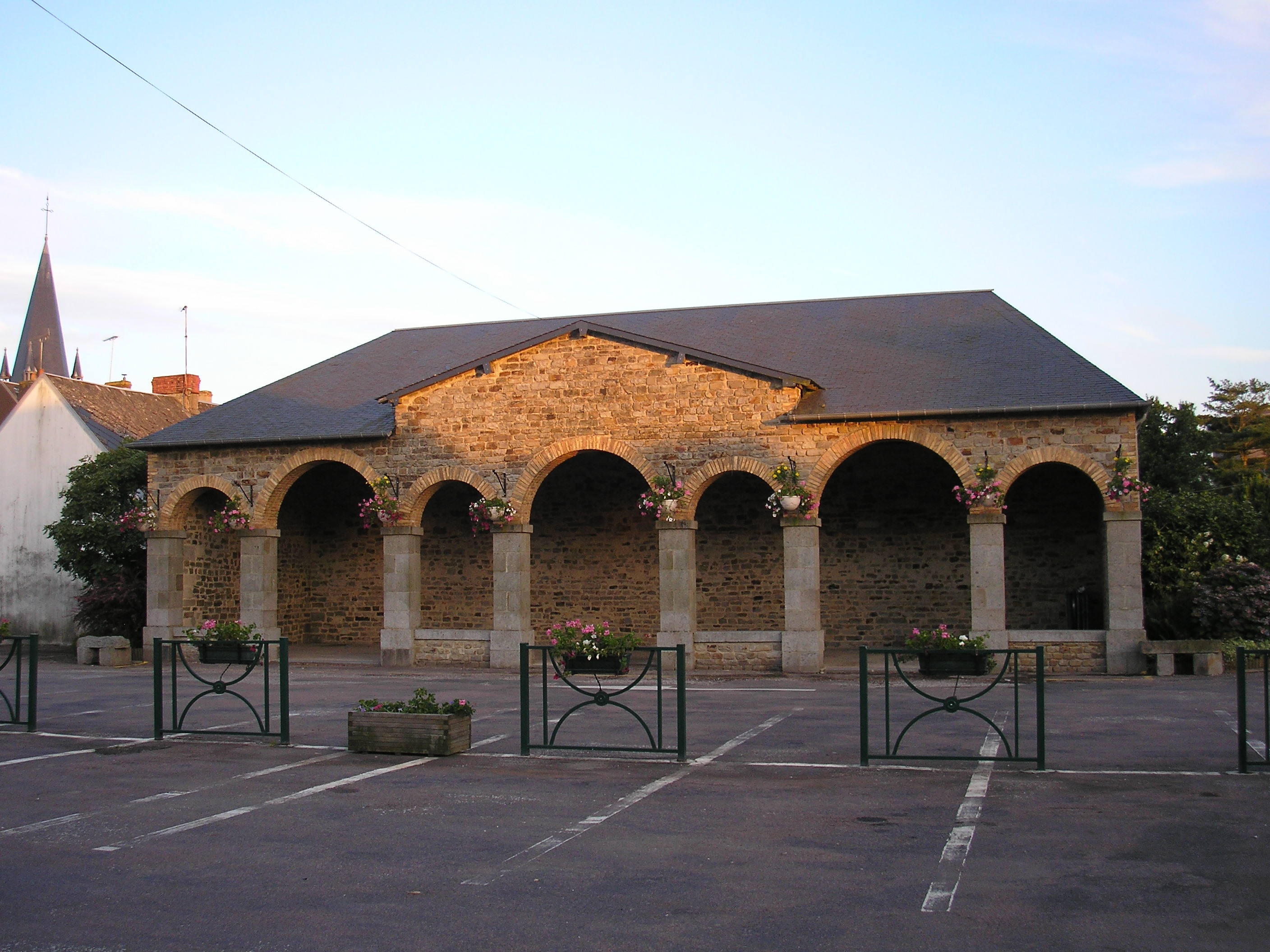 Saint-Martin-des-Besaces (Normandie, France). La halle.